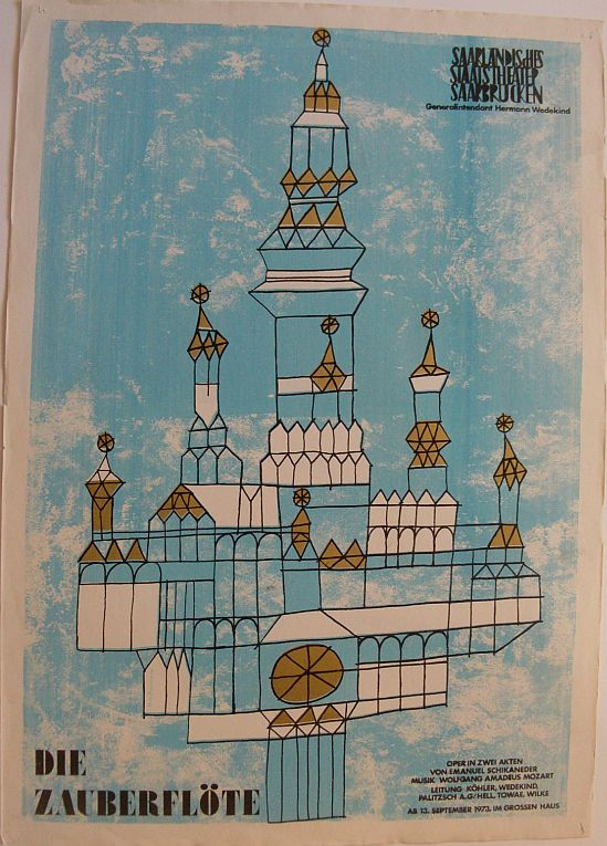 Mozart